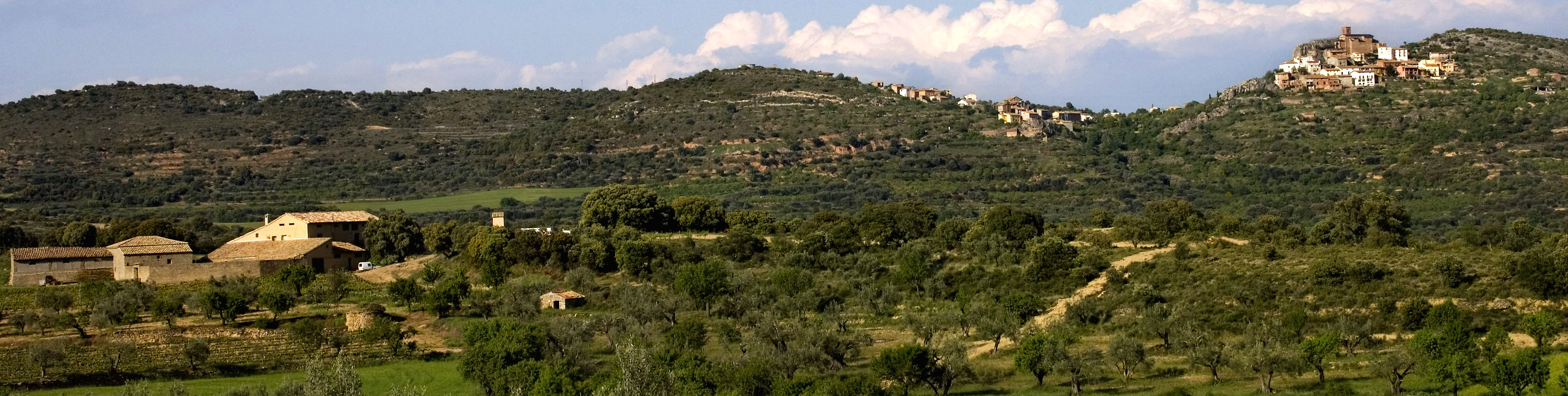 Hoz de Barbastro, Somontano. Aragó.